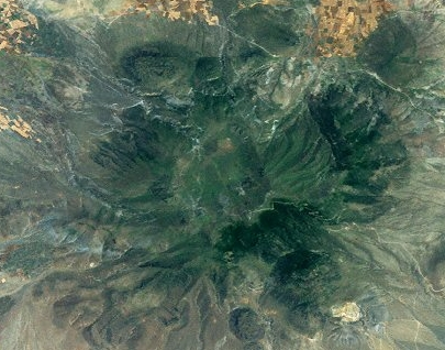 Karadağ, Bergmassiv nördlich Karaman, Türkey